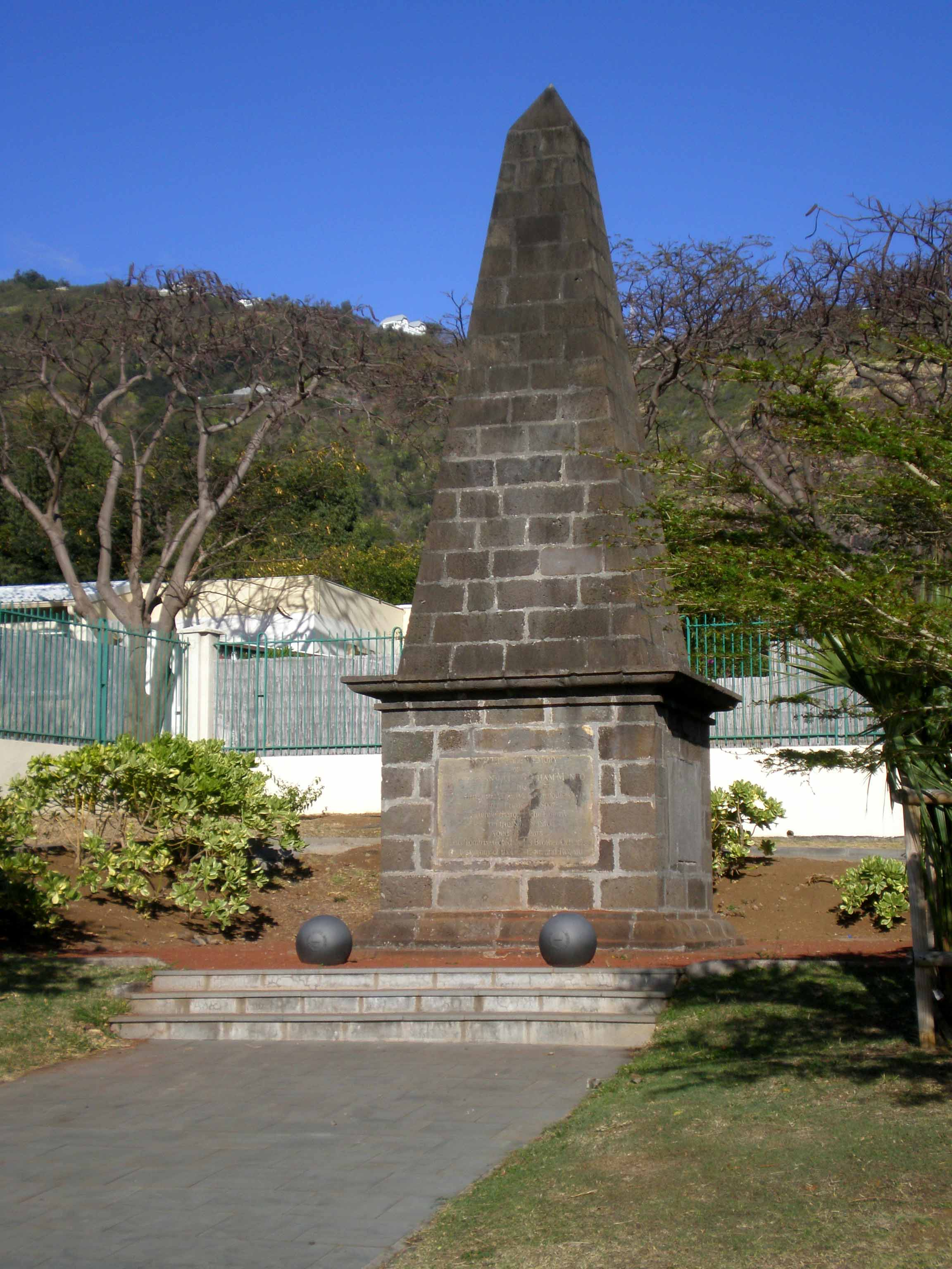 Stèle commémorative du combat entre Français et Britanniques à La Réunion en 1810